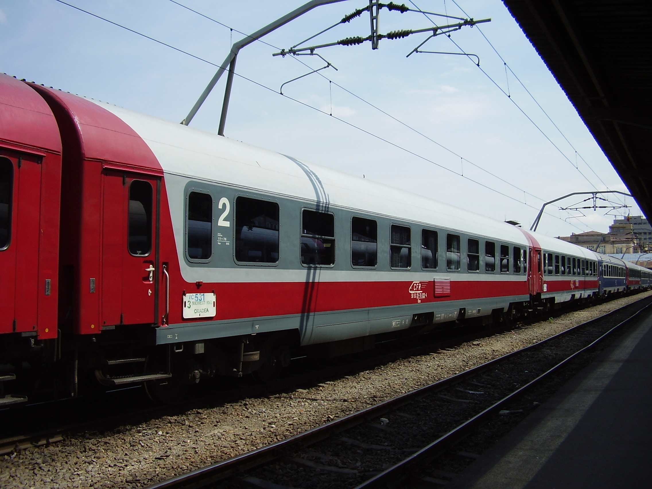 Vagon clasa 20-76, folosit pentru trenuri rapide si interurbane